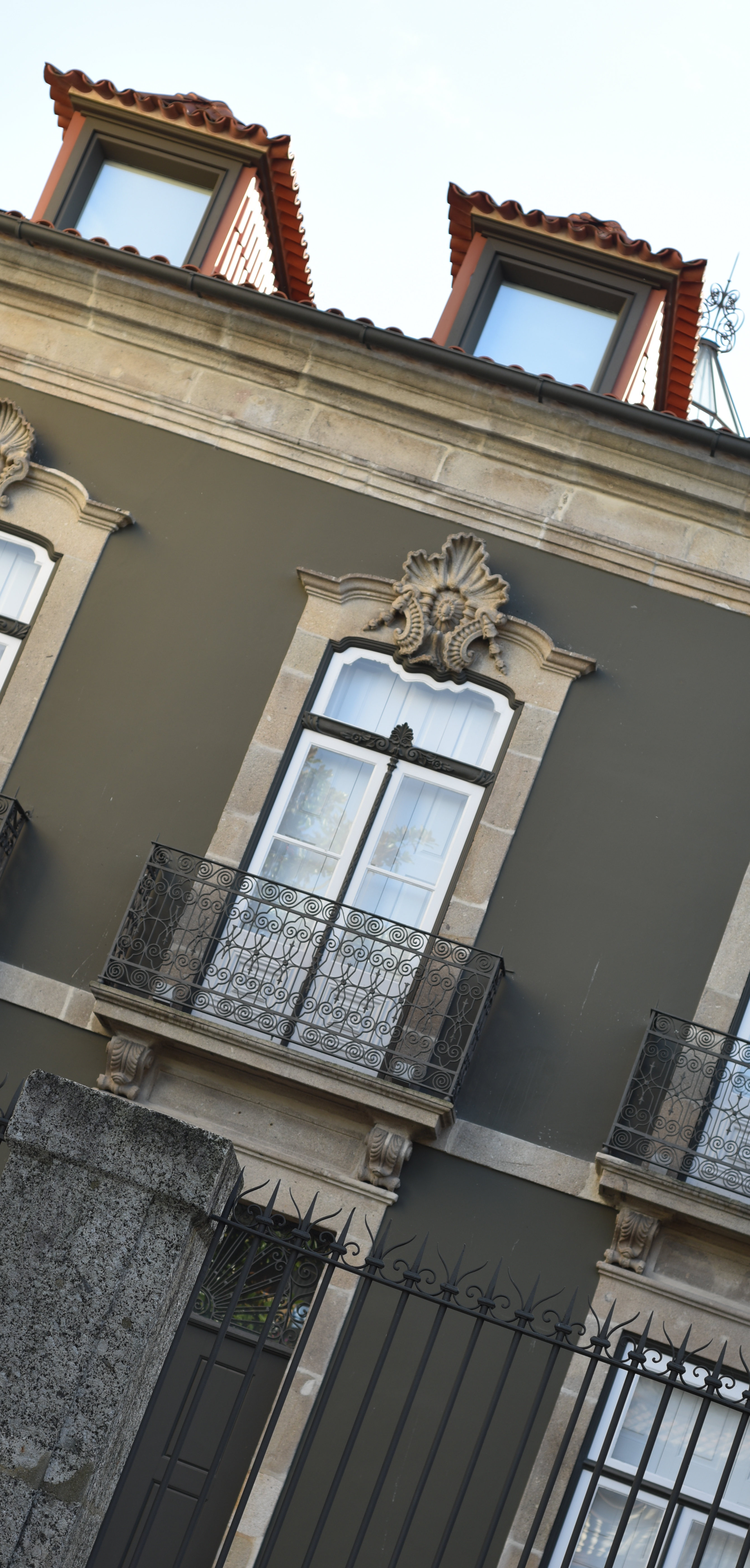 Nikon D810 pure jpeg